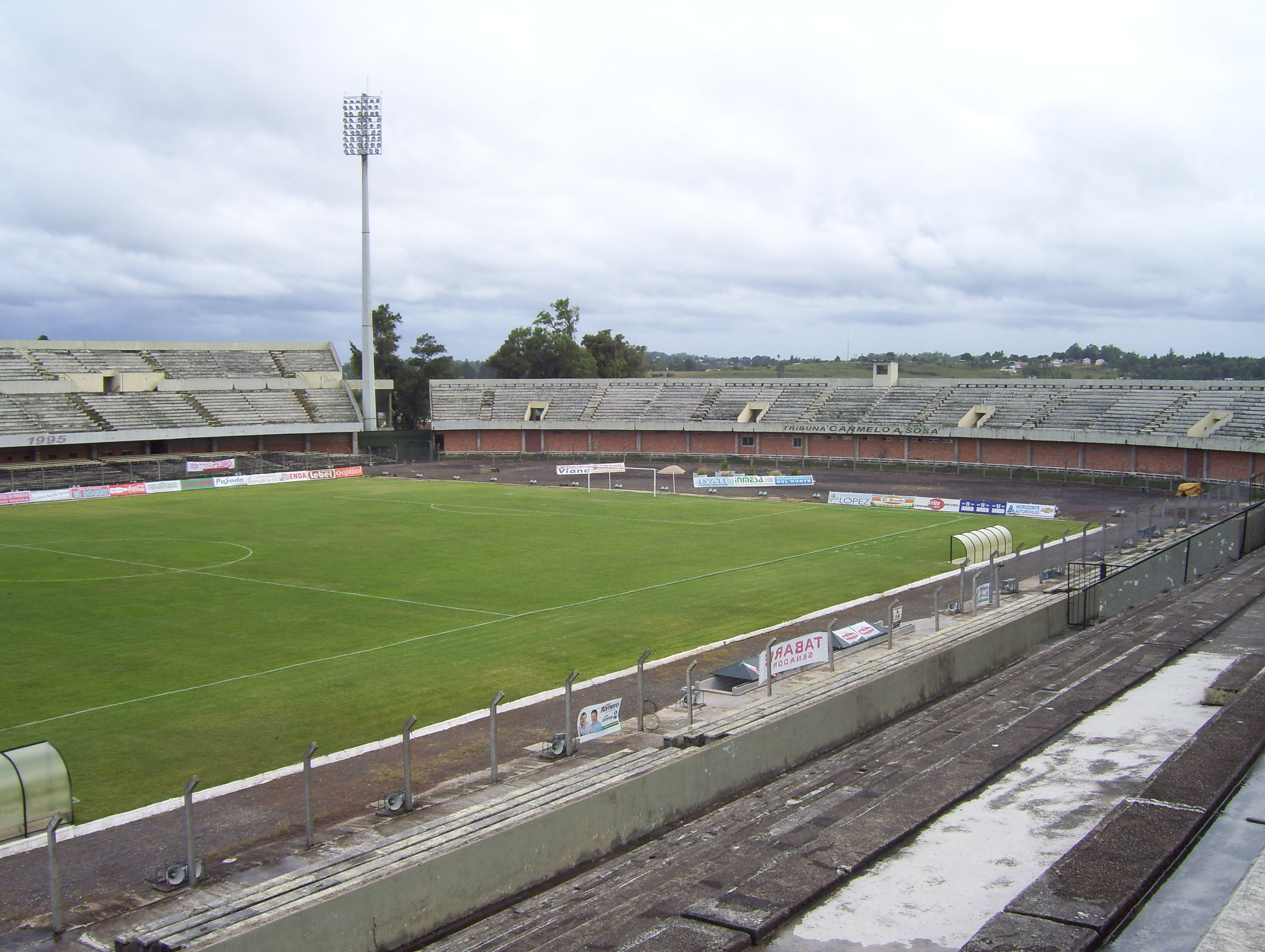 Estadio Municipal Atilio Paiva Olivera en Rivera Urugauy